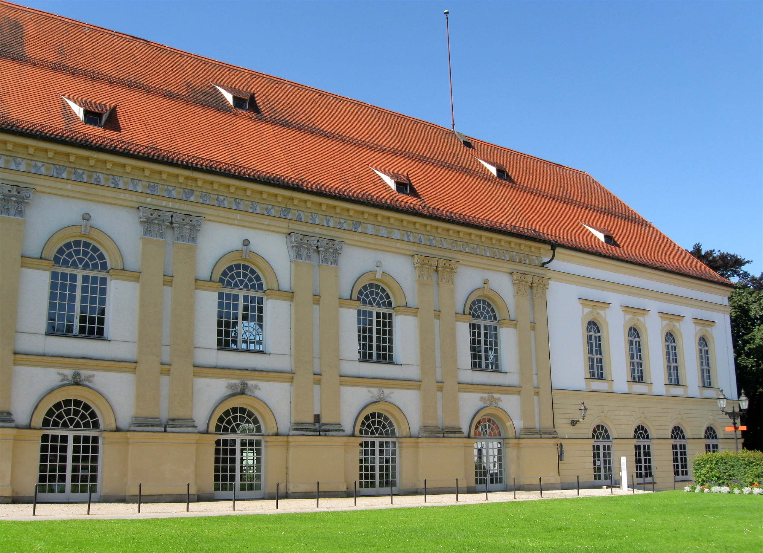 Schloss Dachau, vom Schlossplatz gesehen